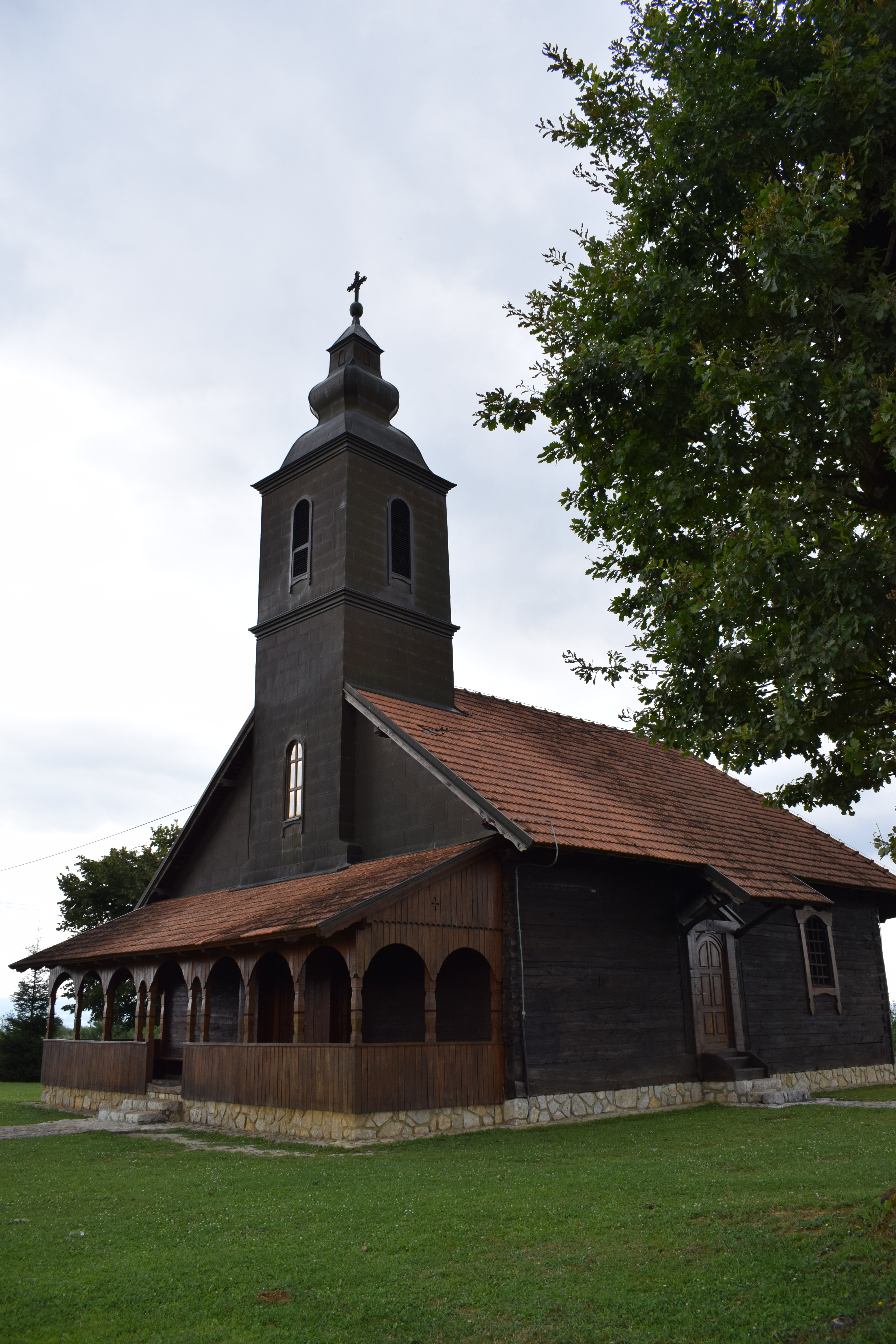 Црква брвнара у Бусновима посвећена је Вазнасењу Господњем. Тачно вријеме градње се не зна јер би 1870. година, која се налази урезана изнад улазних врата, могла бити година градње или једне од бројних обнова. Сигурно је да је главни мајстор био Симо Стојић из Буснова. По широкој заравни, гдје се налази, у народу је познатија као црква Спасовица. Дрвене греде су изворно биле положене на земљу, а у једној значајнијој санацији, 1924. године, подигнуте су на камени подзид. Велика обнова и санација цркве извршена је у периоду од 1994.-1995. године. Урађен је нови иконостас којег је осликао академски сликар из Бањалуке, Љубомир Гајић. Црква брвнара у Бусновима припада парохији Буснови коју чине села Буснови, Томашица и дио Криваје. Пред црквом се за Преображење одржава велики народни збор. У Бусновима је рођен и крштен садашњи Еписком бањалучки Јефрем.